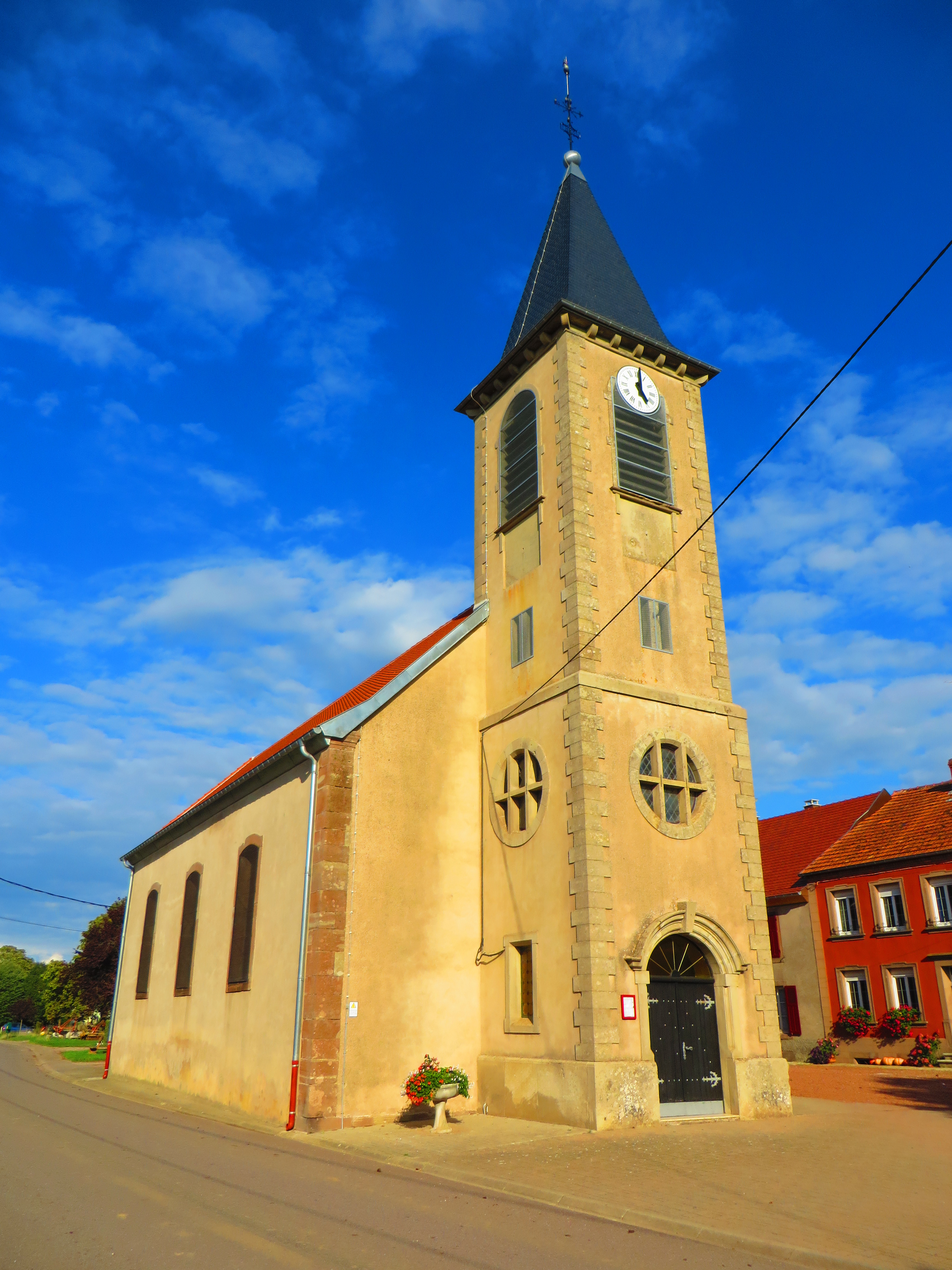 Givrycourt l'église de l'Assomption-de-la-Bienheureuse-Vierge-Marie